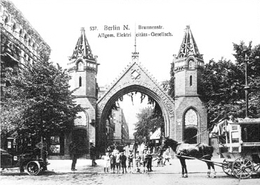 Tor zum AEG-Gelände an der Brunnenstraße von Franz Schwechten